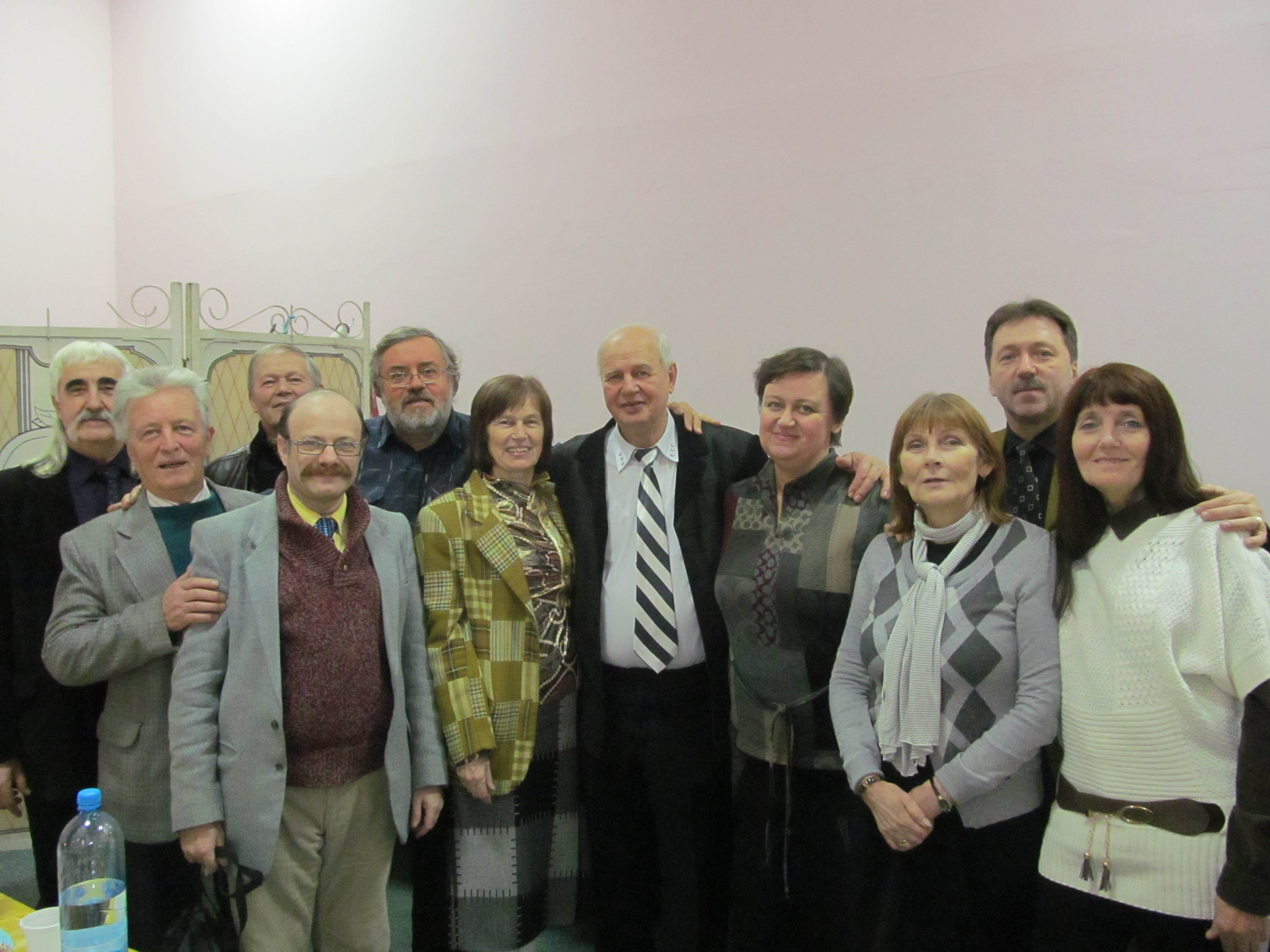 Юбилей композитора Виктора Мужчиля в Харьковской филармонии.